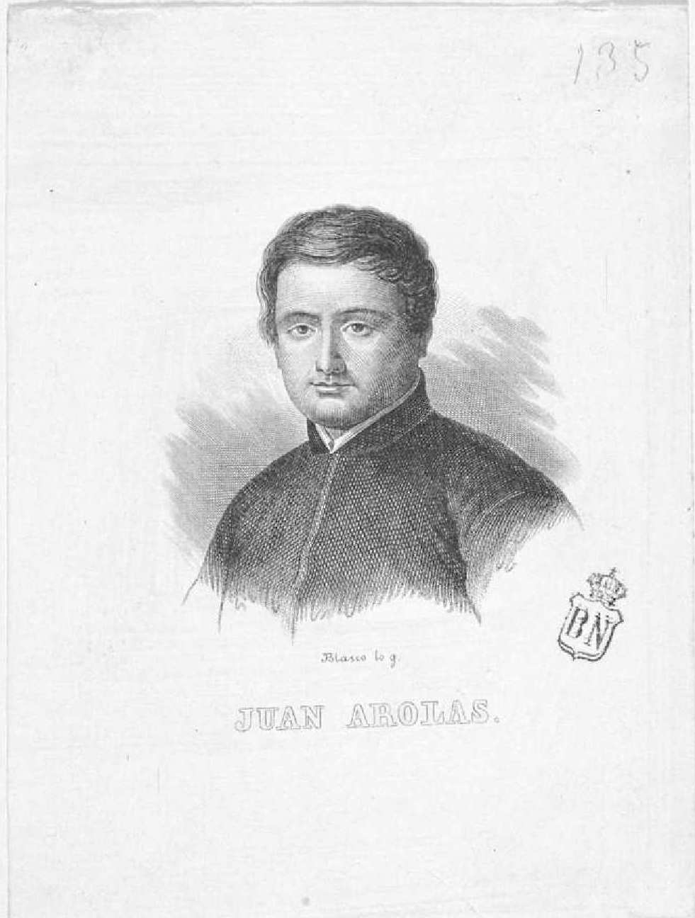 Juan de Arolas, grabado de Teodoro Blasco y Soler. Biblioteca Nacional de España